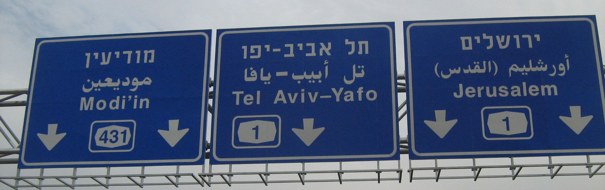 כביש 431 לקראת מחלף ענבה